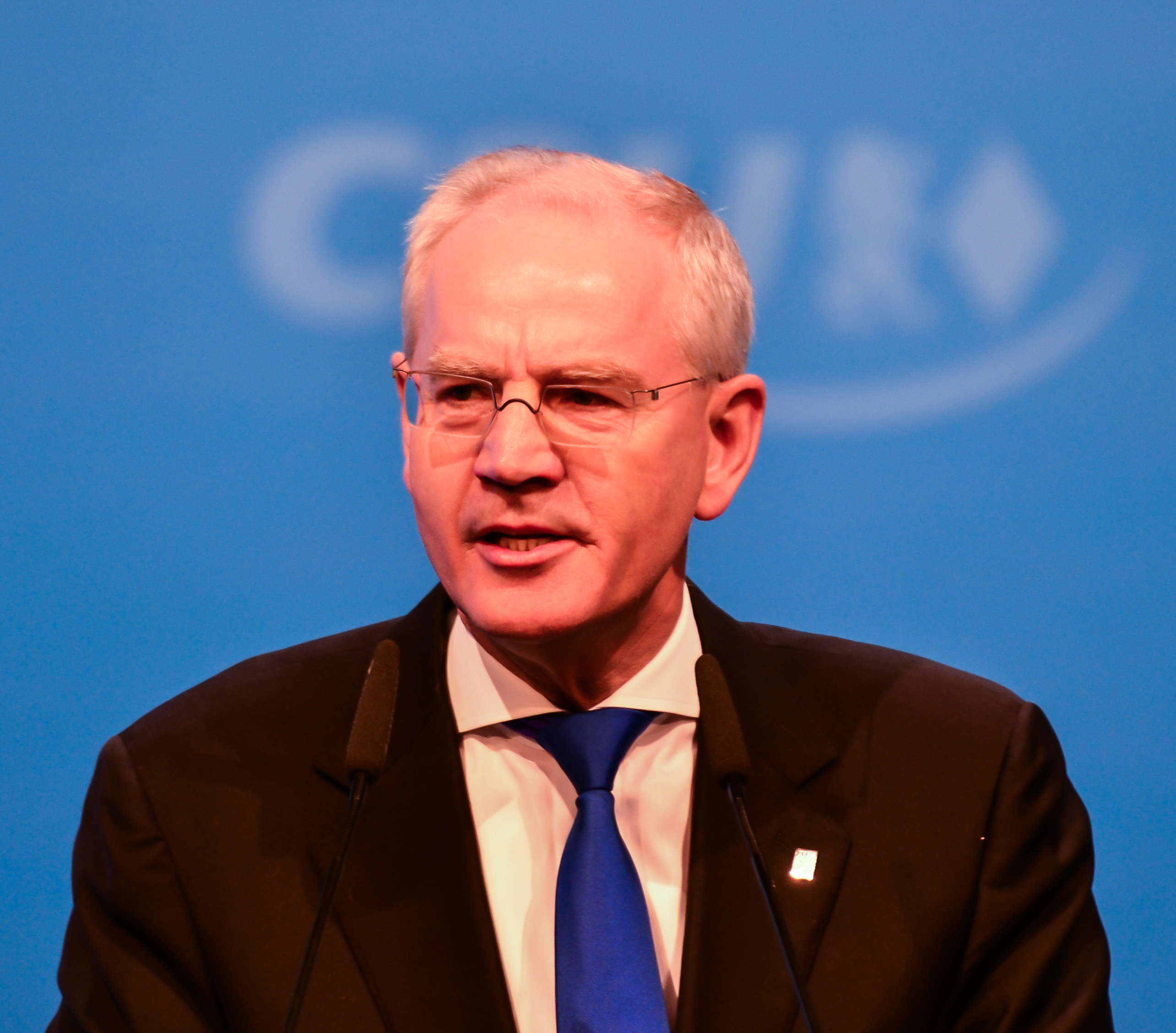 CSU Parteitag 2013 am 23.11.2013 in München